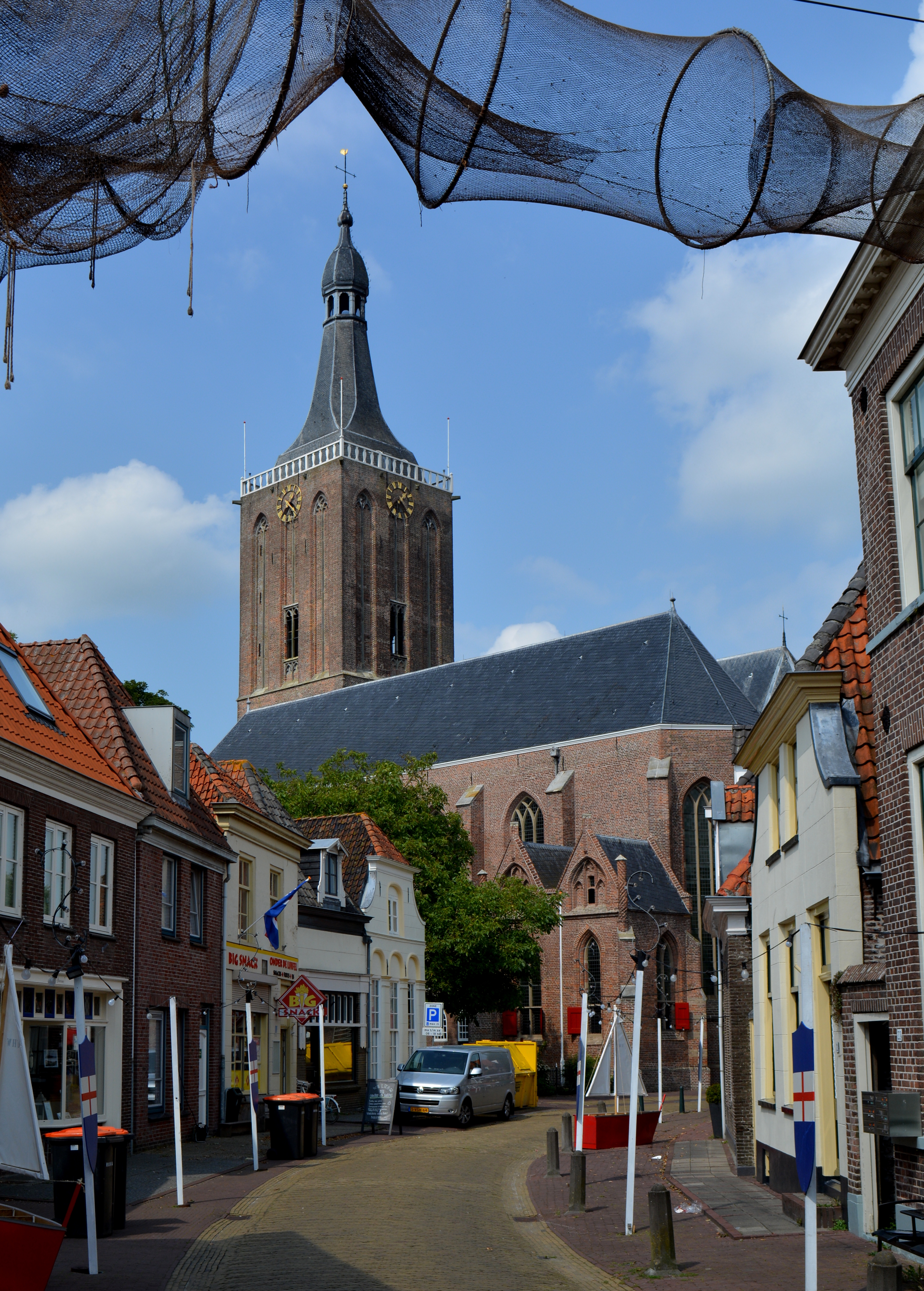 Grote- of Stefanuskerk, Hasselt